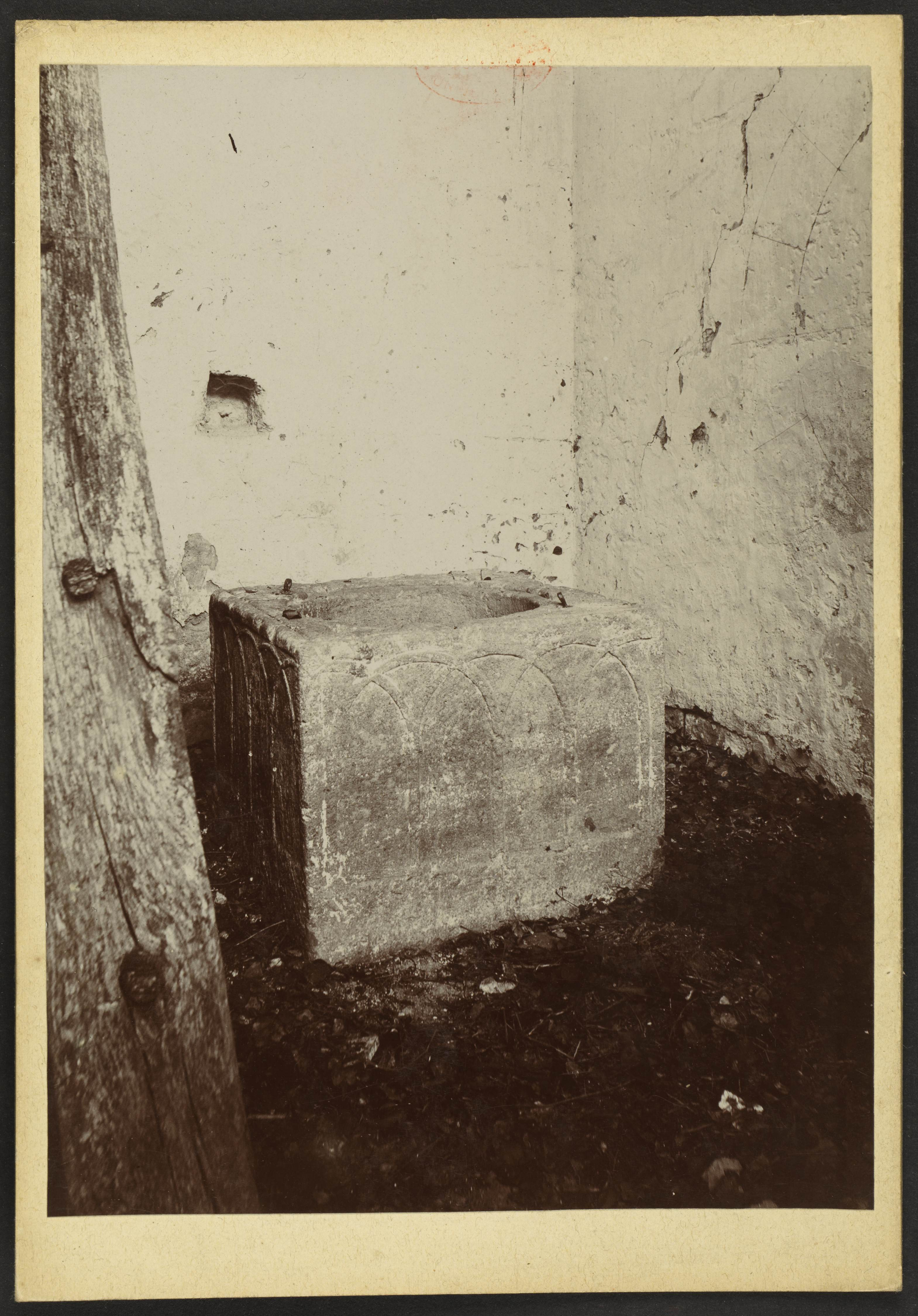 Église Sainte-Présentine de Frontenac; Sallebruneau